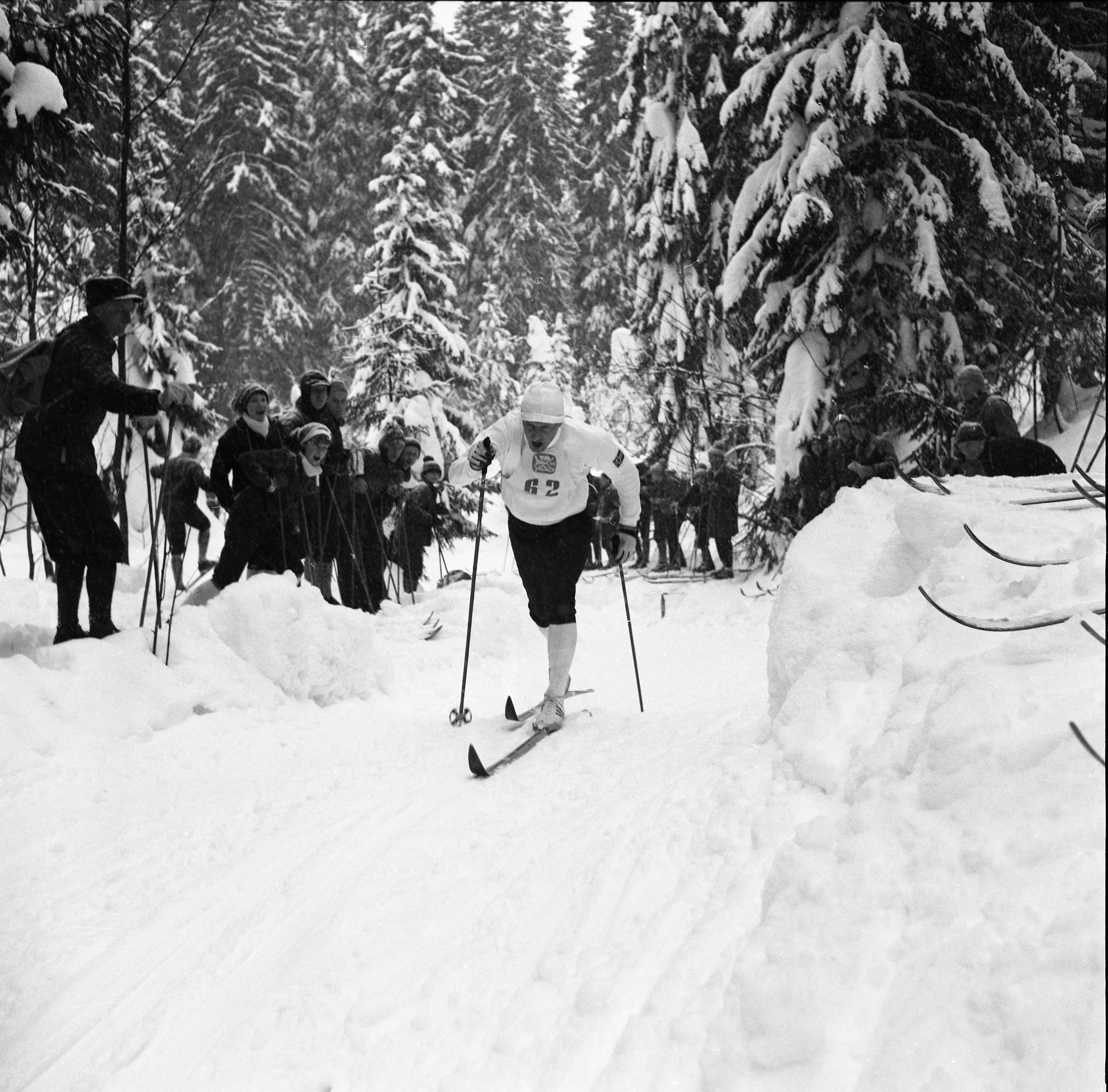 Beskrivelse: Gjermund Eggen, Ole Ellefsæter og Odd Martinsen kapret de tre første plassene under verdensmesterskapet på ski i Oslo/Holmenkollen 1966 Fotograf: Billedbladet NÅ/van Deurs og Østen Sted: Oslo År: 1966 Arkivreferanse: RIKSARKIVET- RA/PA/0797/U/Ua/3900_2_008